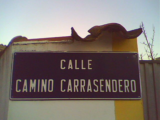 Placa de calle en Aguilafuente (localidad rural de la provincia de Segovia). Su nombre es "Calle Camino Carrasendero", lo que es una curiosa coindicencia en un sólo odónimo (es decir, topónimo viario) de cuatro odónimos genéricos: "calle", "camino", "carra-" (prefijo muy común en el campo castellano) y "sendero".